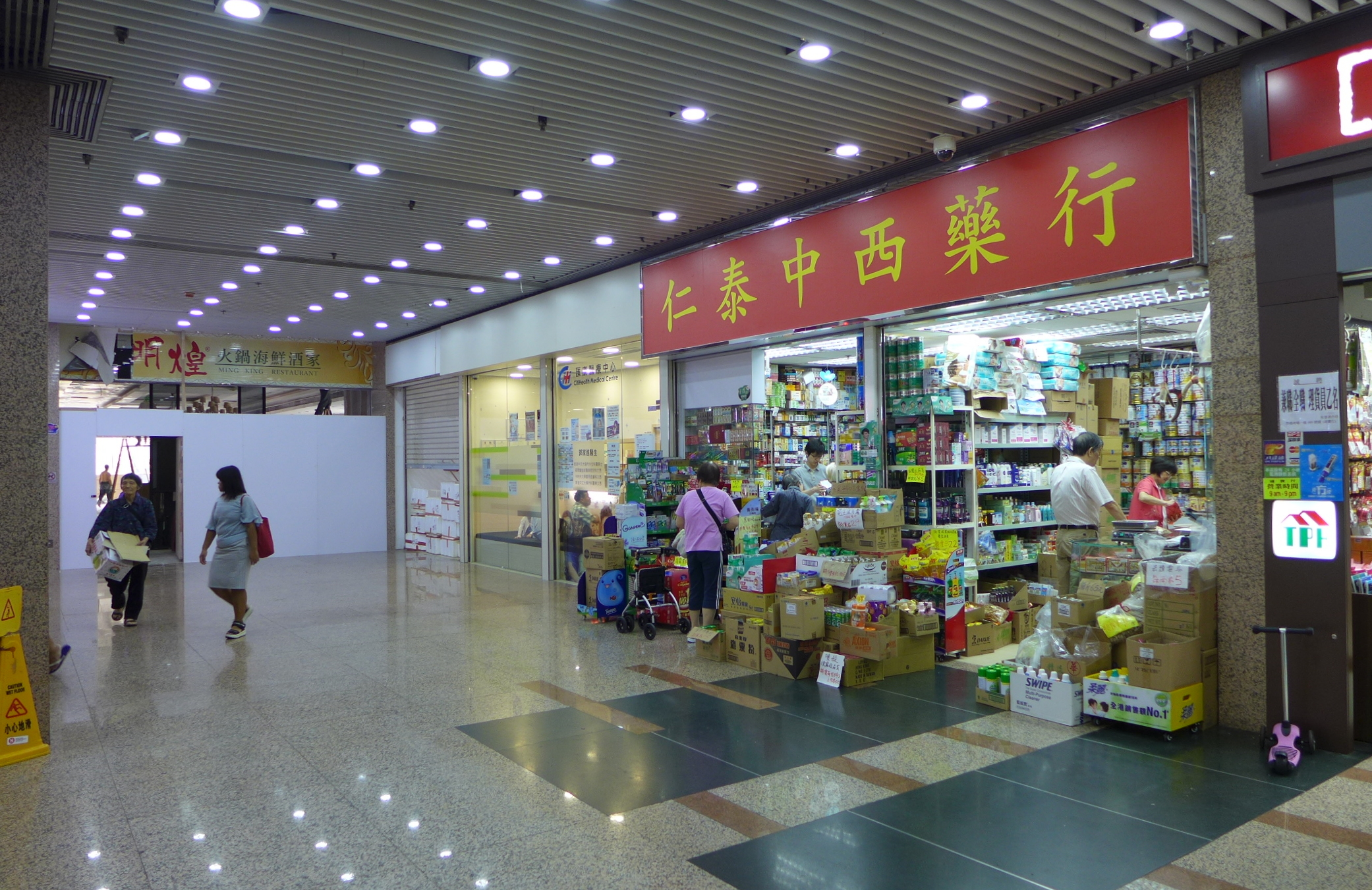 Kai Tak Garden Arcade 1F Shops